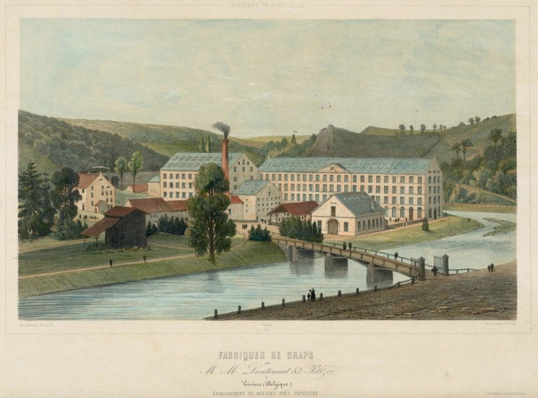 Lithografie van de wolfabriek Lieutenant & Peltzer aan de rivier de Vesdre in Pepinster, België, afgedrukt in het album La Belgique Industrielle uit 1850. In 1921 kwam het bedrijf onder de naam Textile de Pepinster in handen van de Maastrichtse ondernemers en broers Jules (II) en Georges Regout, echtgenoten van de zussen Adrienne en Jeanne Lieutenant, dochters van Alfred Lieutenant. De fabriek sloot in 1976.